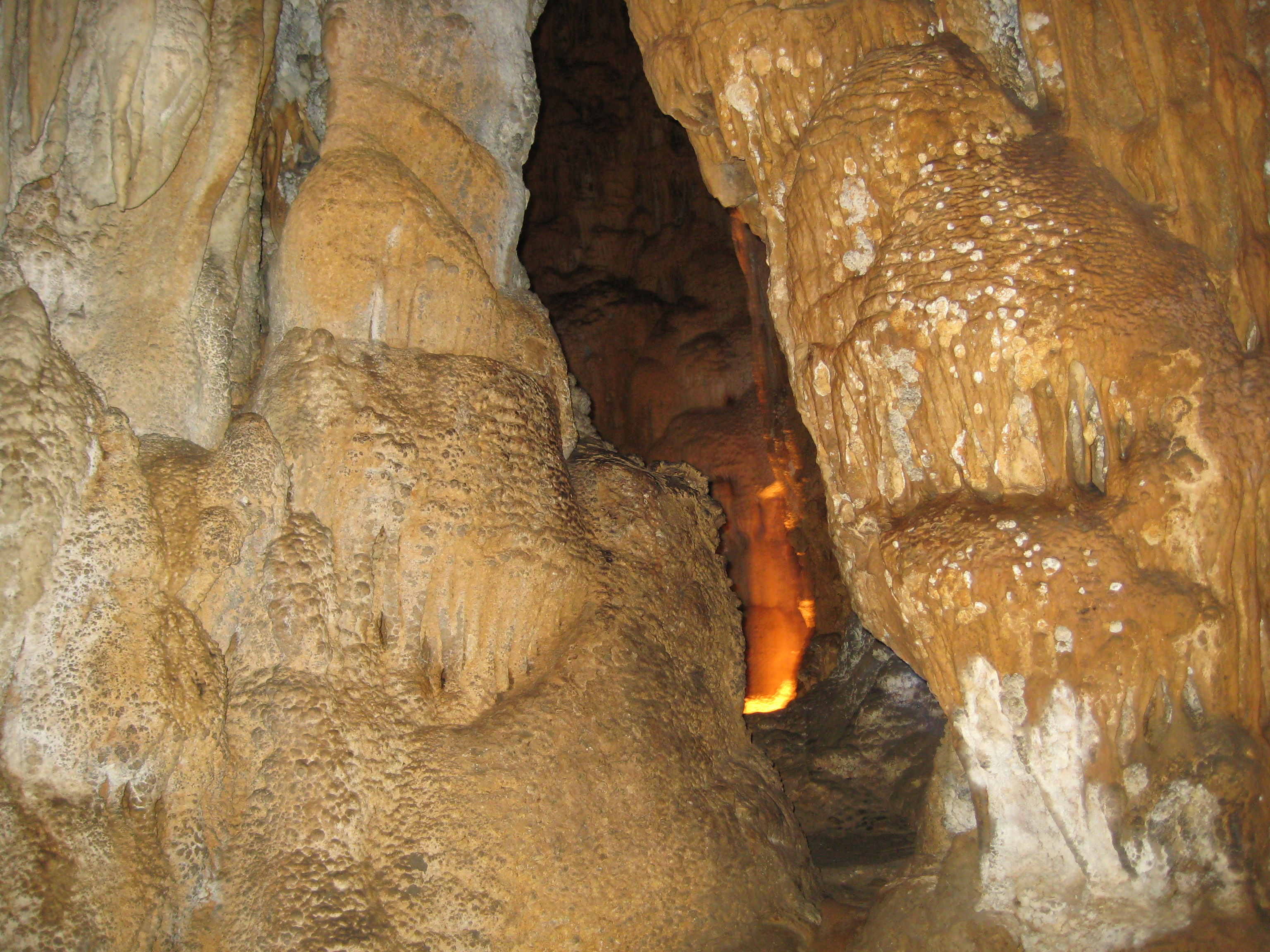 Phong Nha-Ke Bang National Park in Vietnam